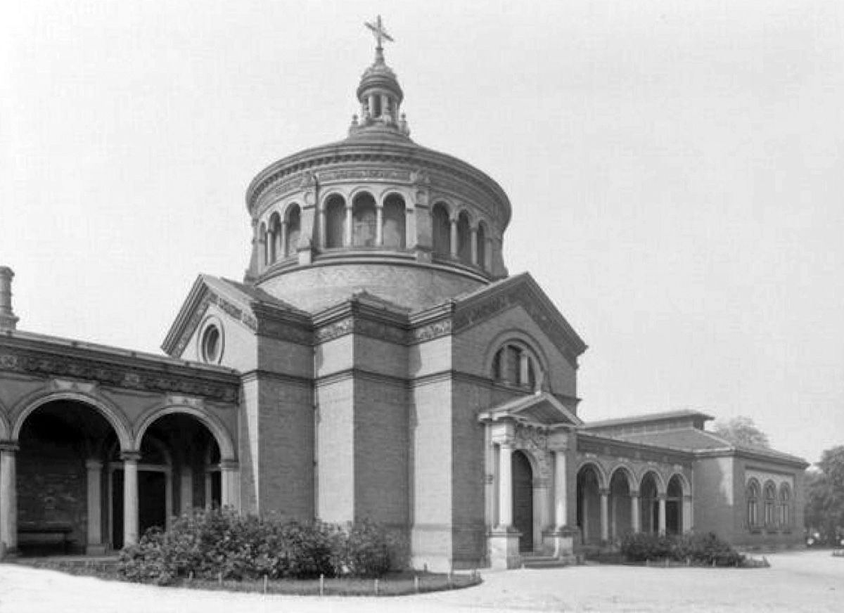 Die 1883 fertiggestellte Trauerhalle auf dem Neuen Johannisfriedhof Leipzig. Architekt Hugo Licht.